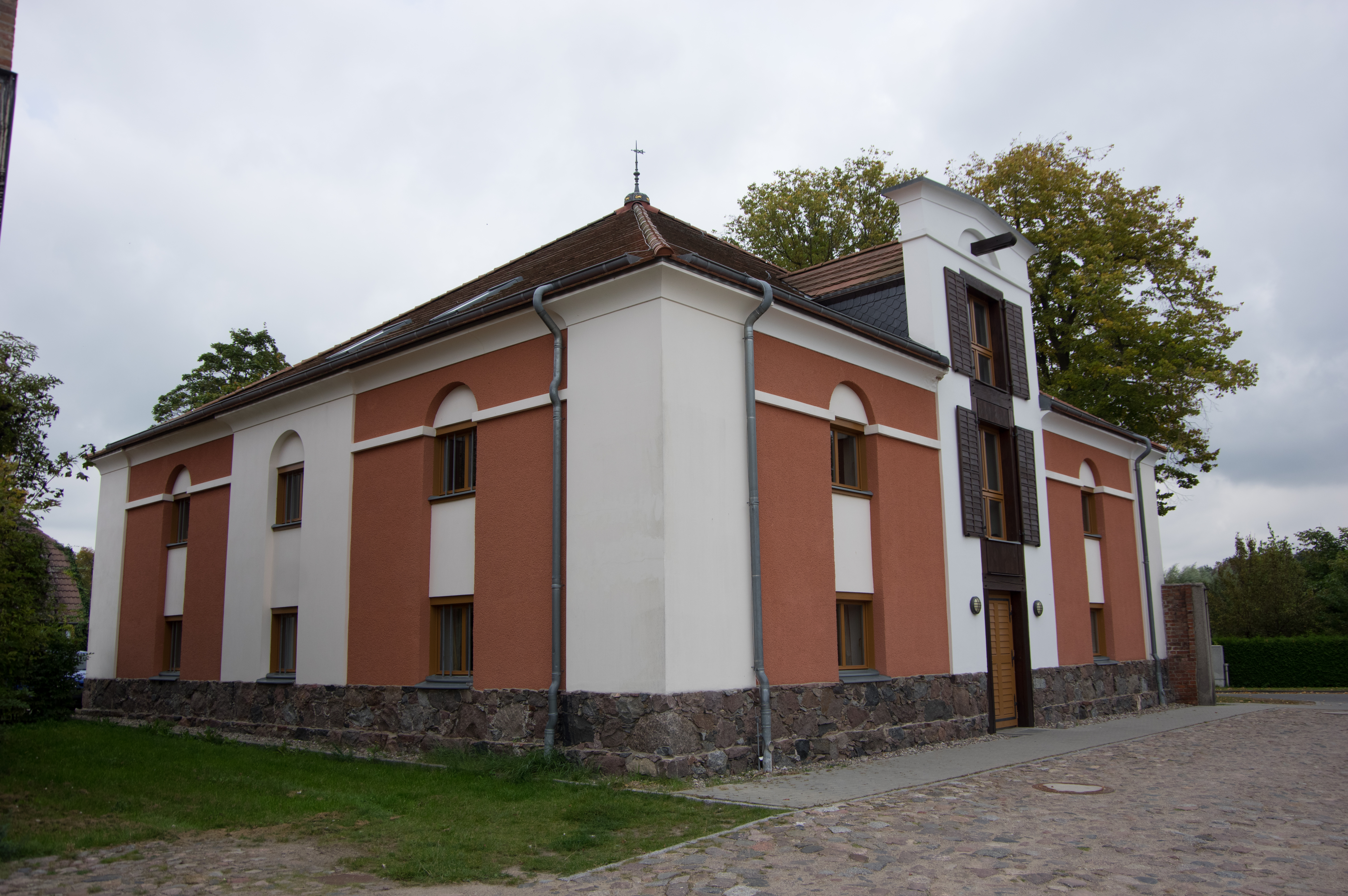 Schwedt/Oder, Ortsteil Criewen in Brandenburg. Das Schloss oder Herrenhaus Criewen wurde in der heutigen Form ab 1818 erbaut.